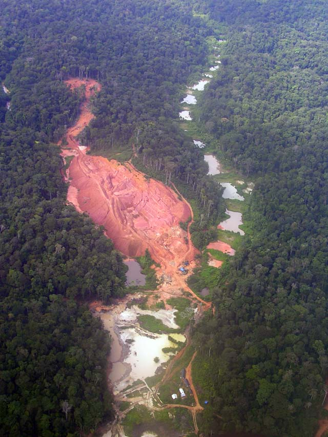 Mine industrielle extraction d'or primaire et alluvionnaire